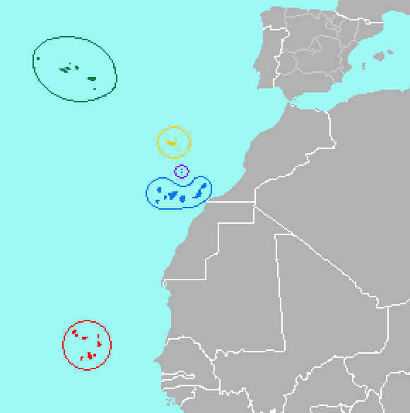 Macaronesia. Canarias Cabo Verde Madeira Azores Salvajes